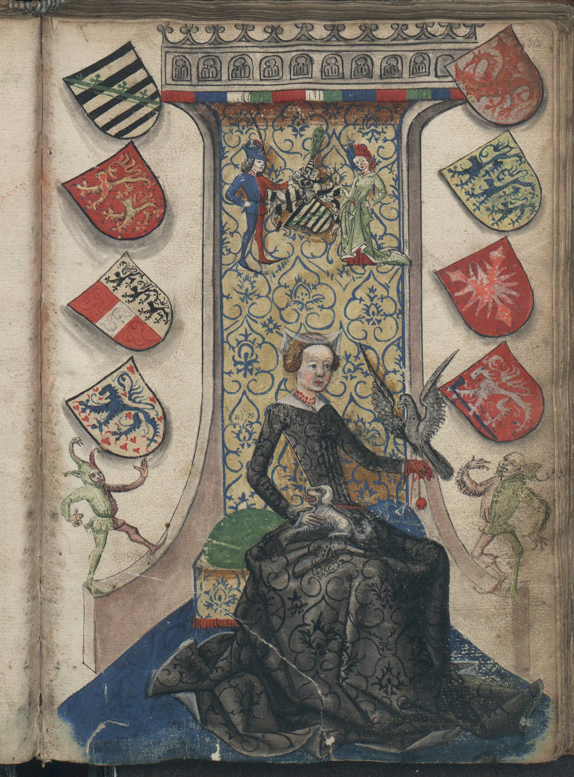 Heroldsbuch der jülich-bergischen Hubertusbruderschaft, Biblioteka Jagiellonska Krakow, berol. ms. germ. quart. 1479, Fol. 50r.